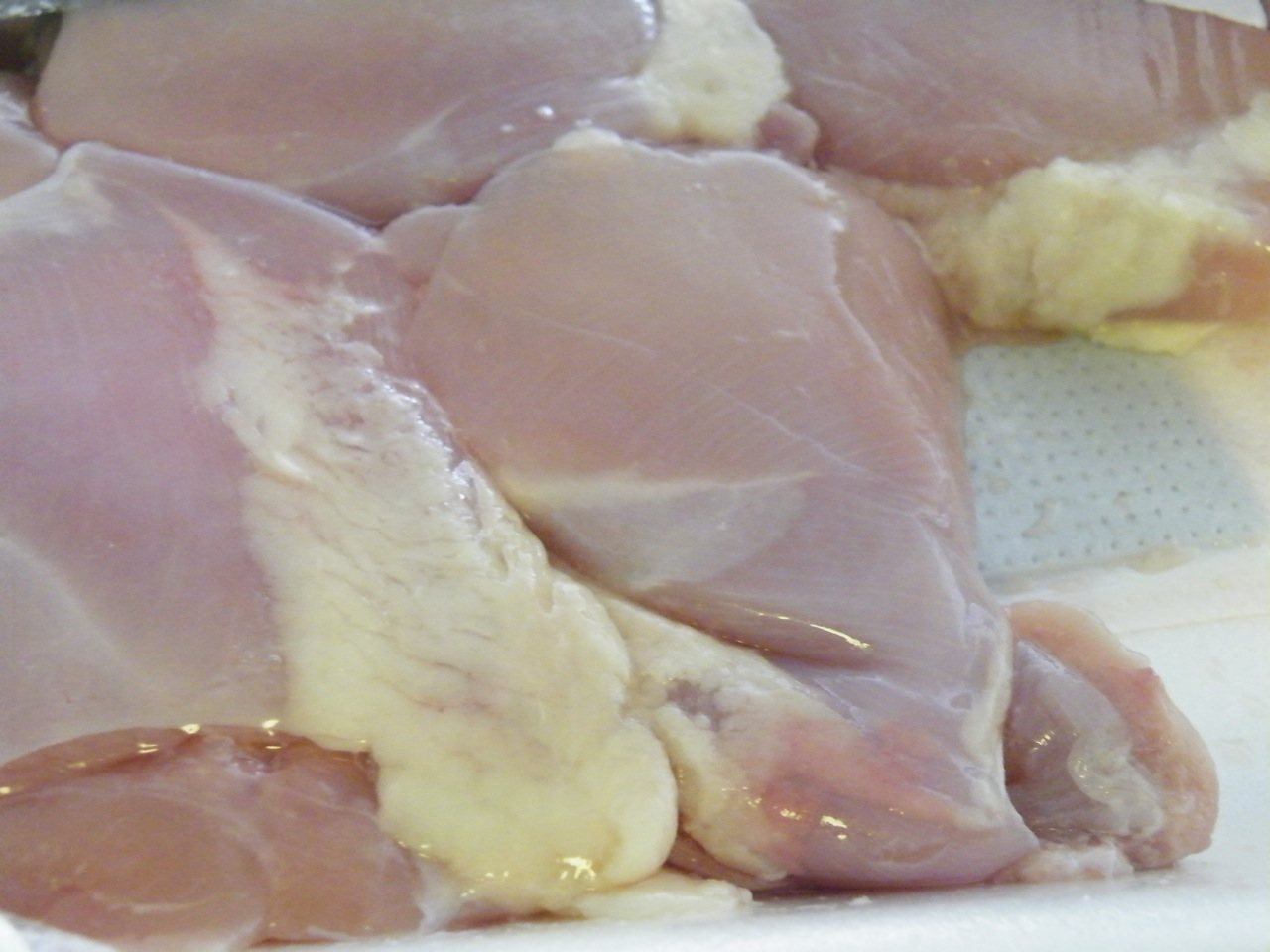 פרגיות עוף